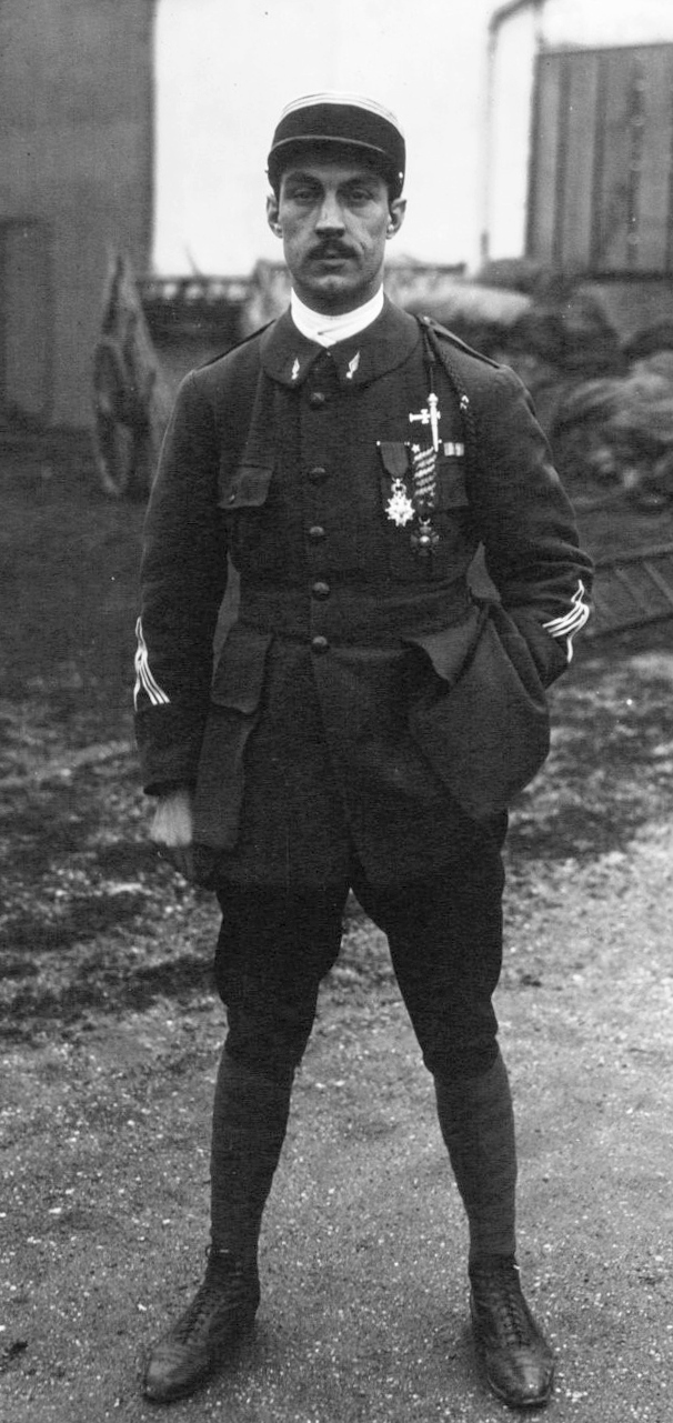 L'hydravion Spad, le capitaine Decoin ("quatre boches") : [photographie de presse] / Agence Meurisse